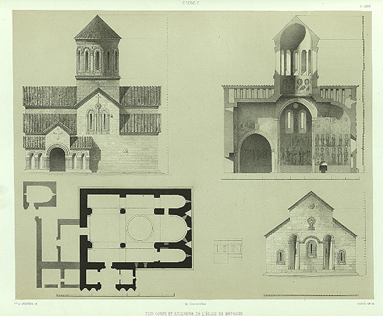 Georgie. Plan, coupe et exterieur de l'eglise de Bethanie.